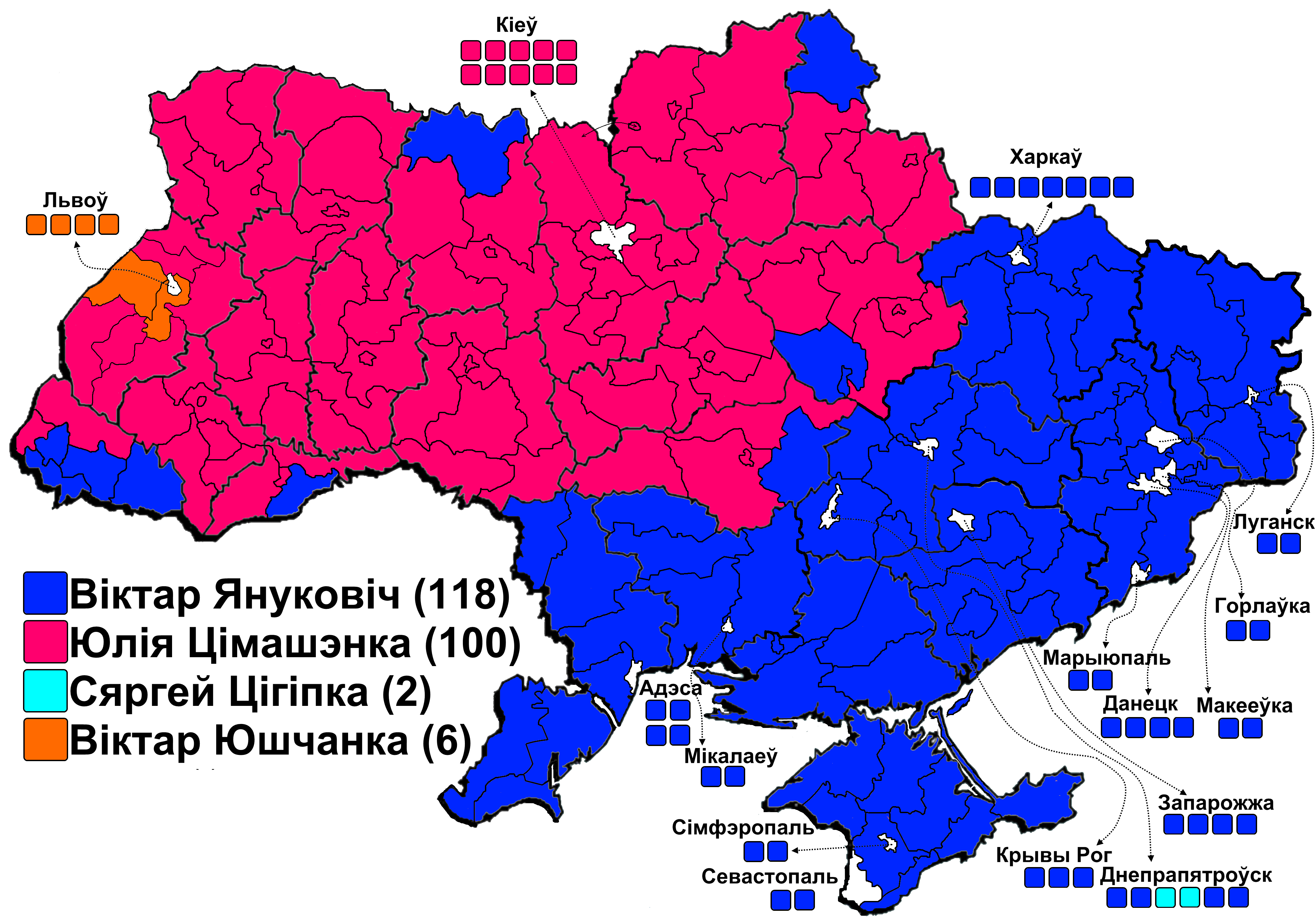 Пераможцы па акругах на выбарах Прэзыдэнта Ўкраіны 2010